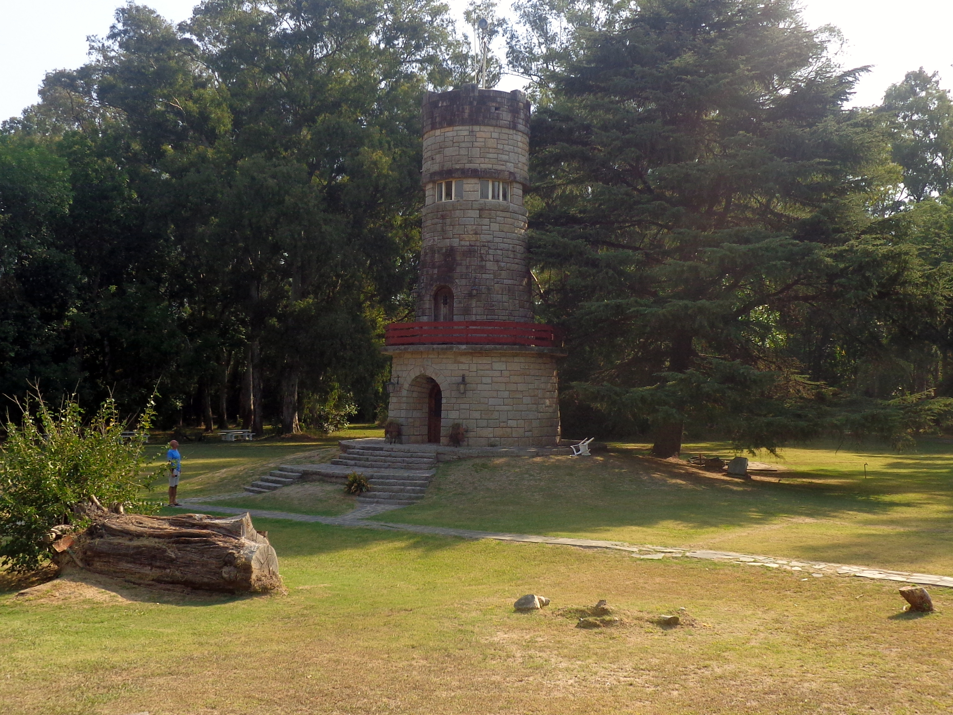 Quinta de San Vicente (oficialmente Museo Histórico "17 de Octubre") ex residencia del presidente argentino Juan Domingo Perón, la cual adquirió antes de alcanzar la presidencia.​ San Vicente, provincia de Buenos Aires, Argentina. En ella se encuentran los restos del mismo Juan Domingo Perón.